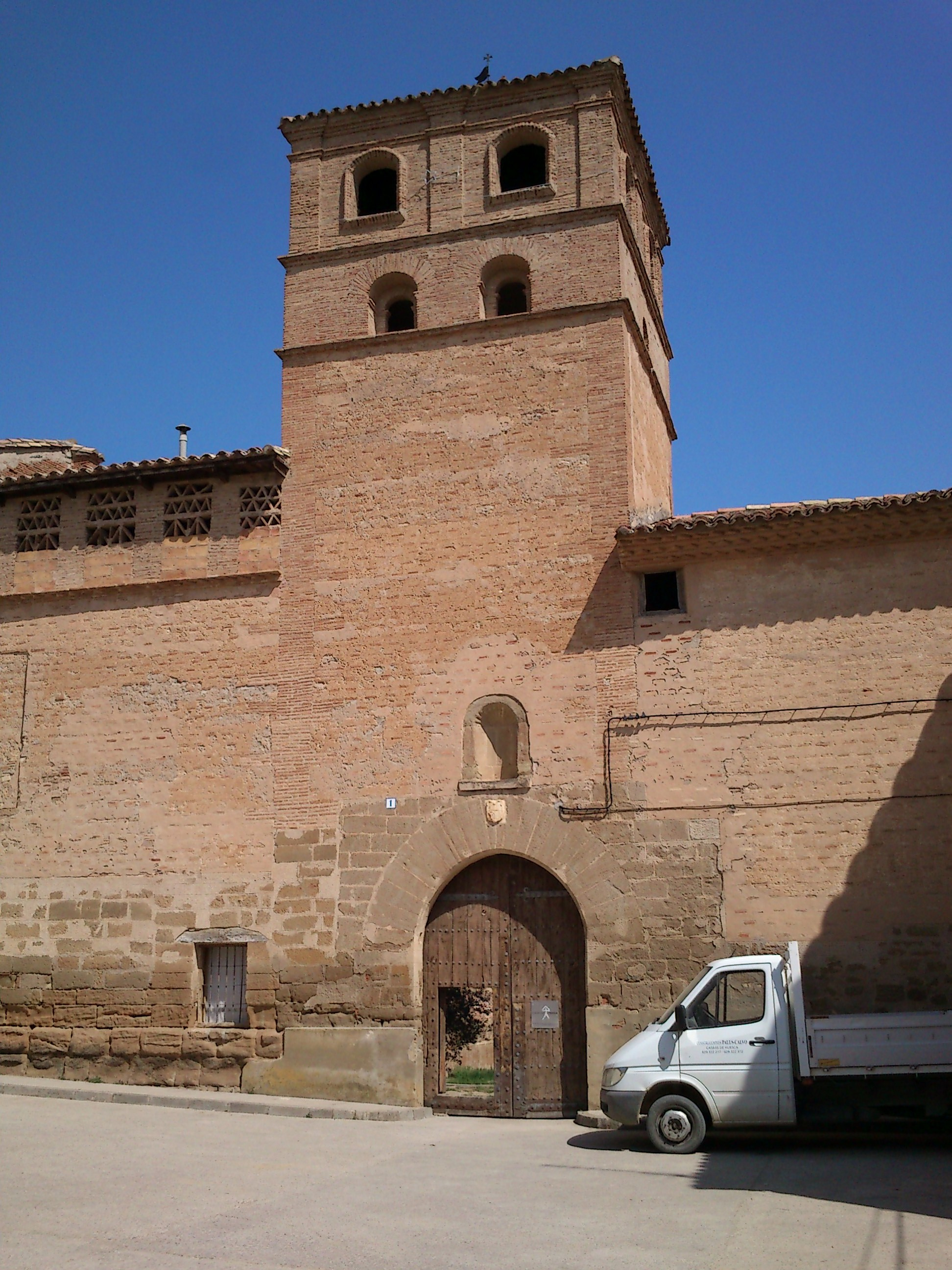 Monasterio de Casbas de Huesca, en el municipio de Casbas de Huesca, provincia de Huesca